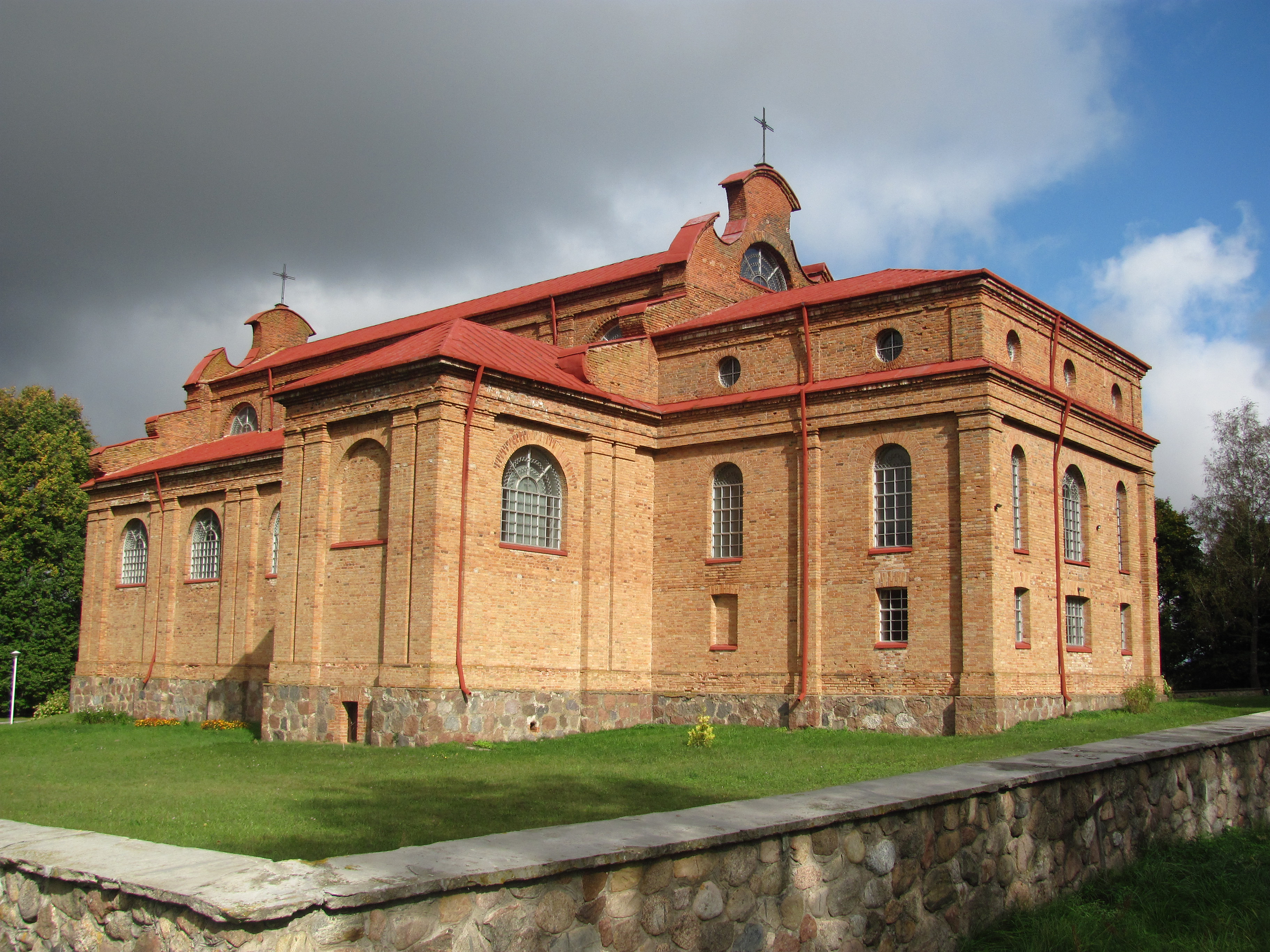 Беларуская (тарашкевіца): Касьцёл Унебаўзяцьця Найсьв. Панны Марыі. в. Налібакі This is a photo of Belarusian heritage monument. Reference number: 613Г000618 ( WLM)